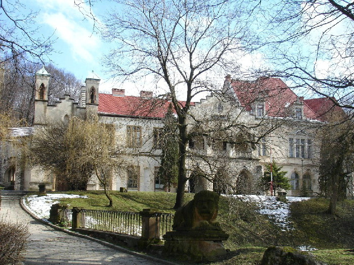 Frankiewicz palace in Młoszowa, Poland